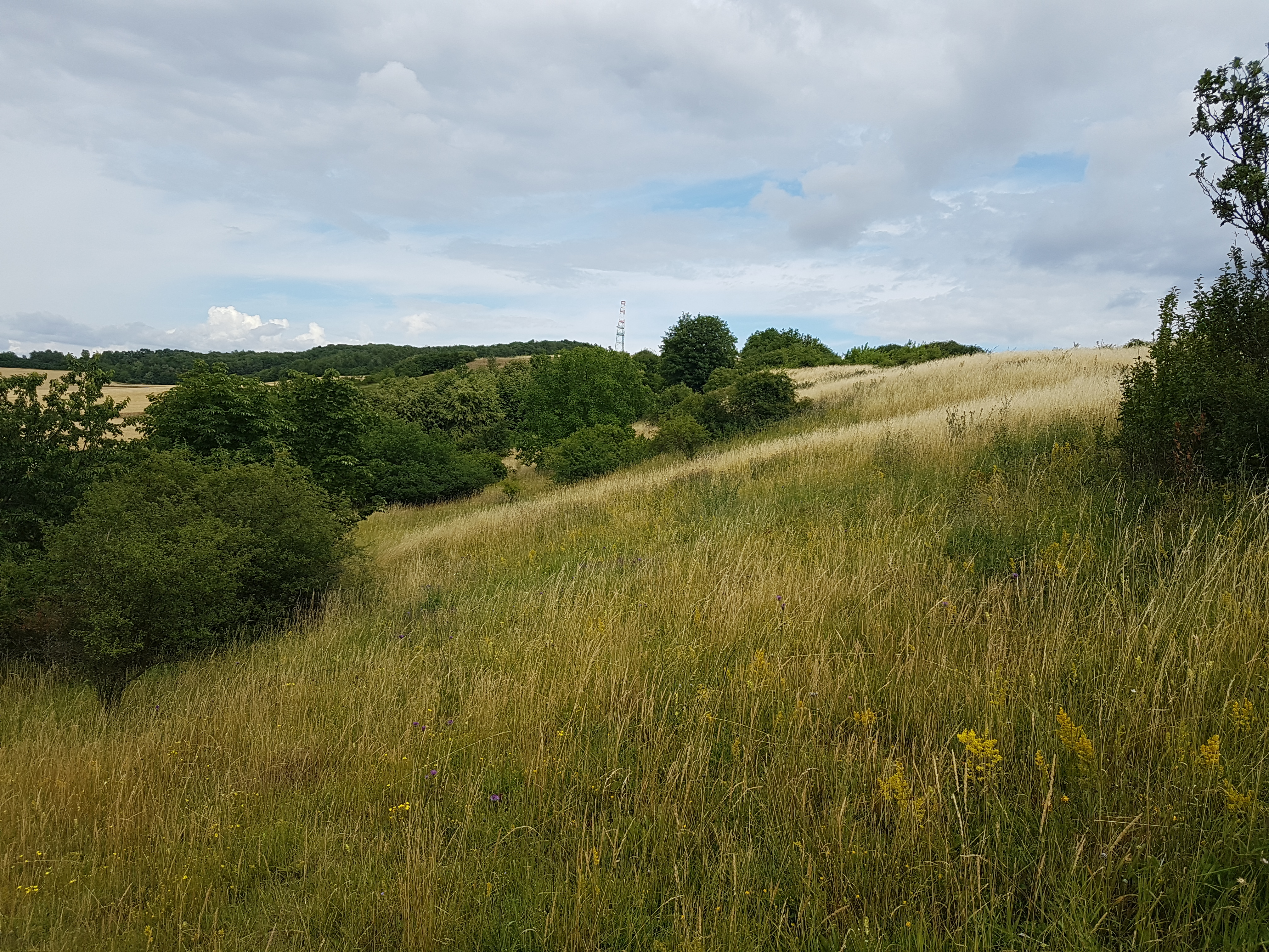 Louka v Návdavkách